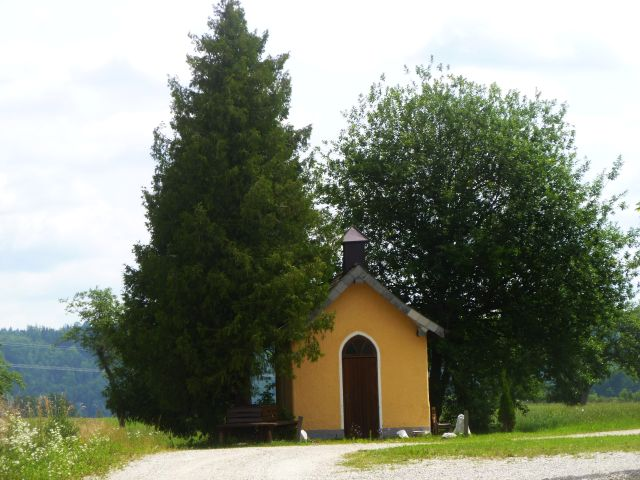 St._Veit_im_Innkreis-Epitaph_der_Hackledter-4